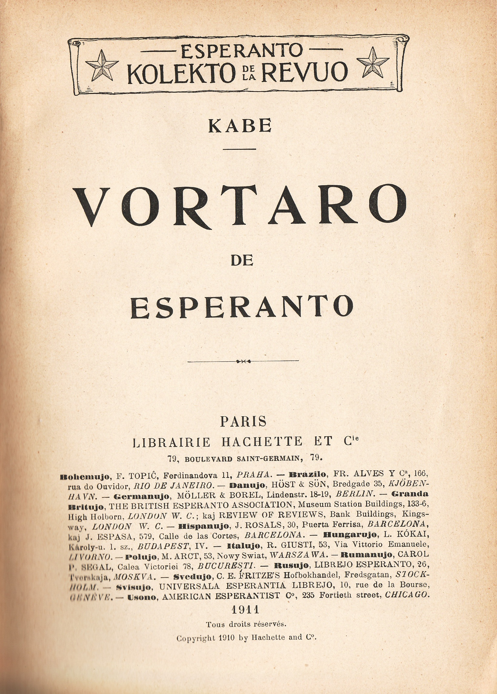 Vortaro de Esperanto